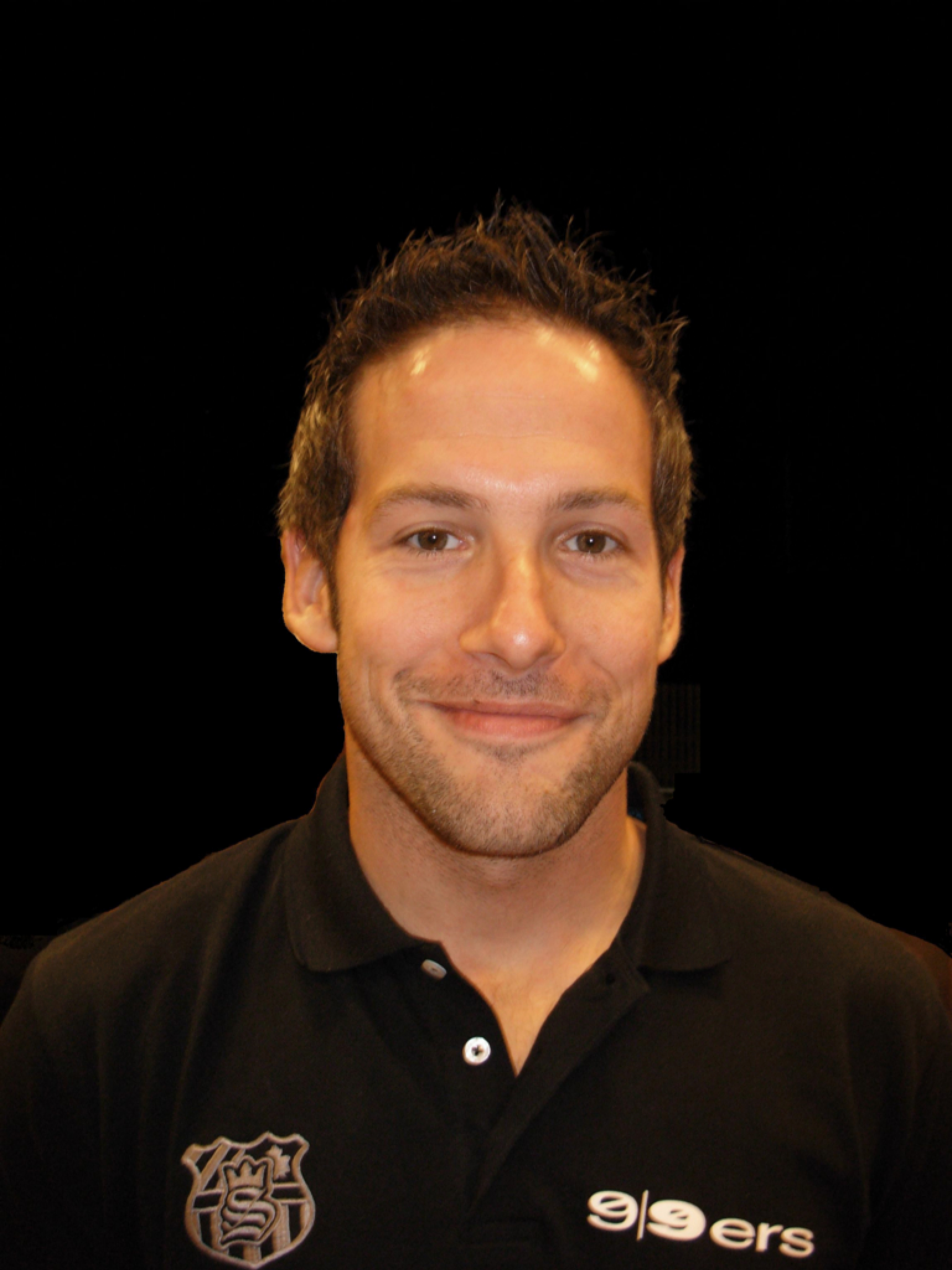 Eishockeyspieler Robert Guillet